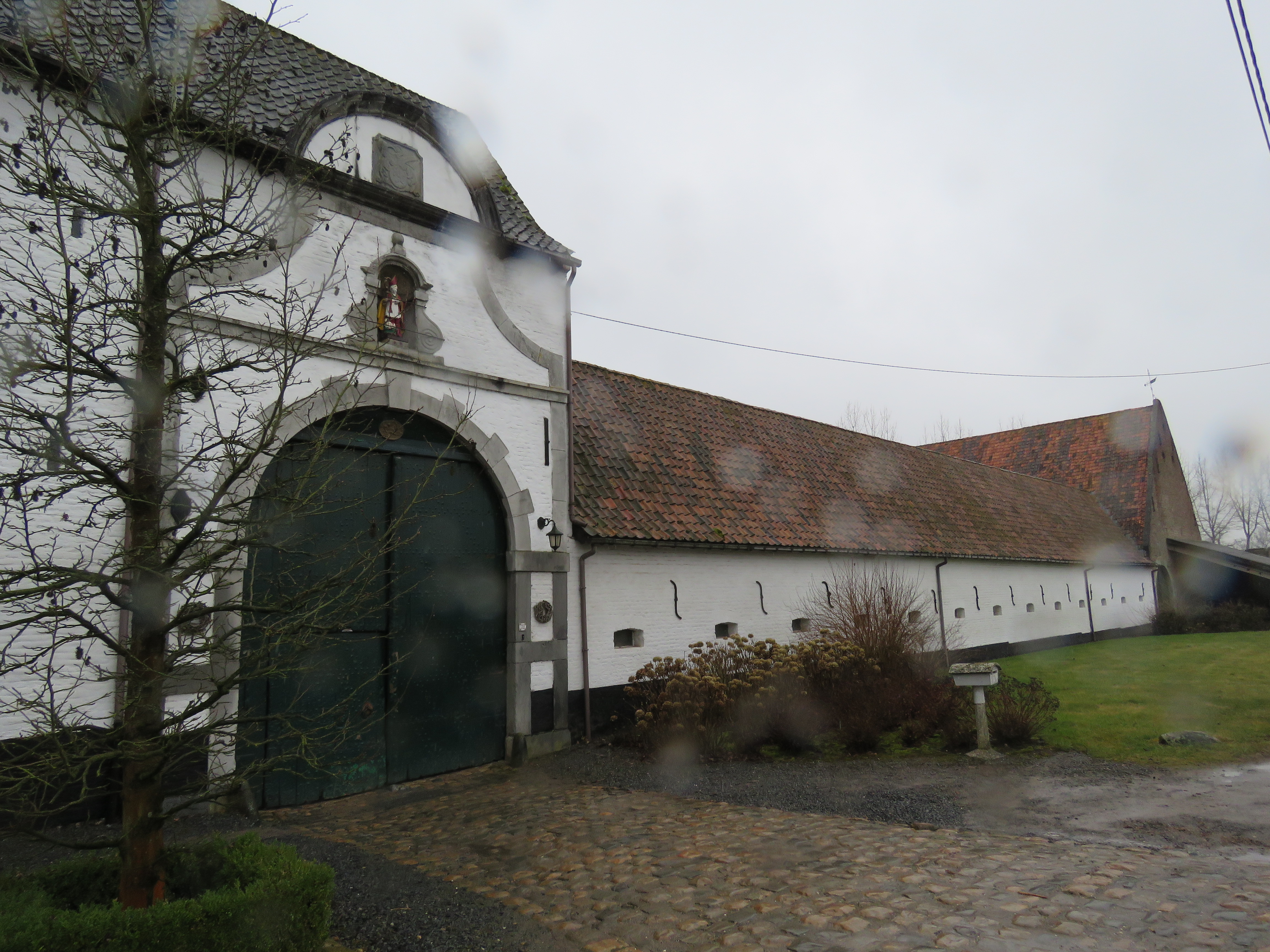 Poort van Sint-Niklaashoeve, abdijhoeve van voormalige abdij van Terbeek uit 17de eeuw